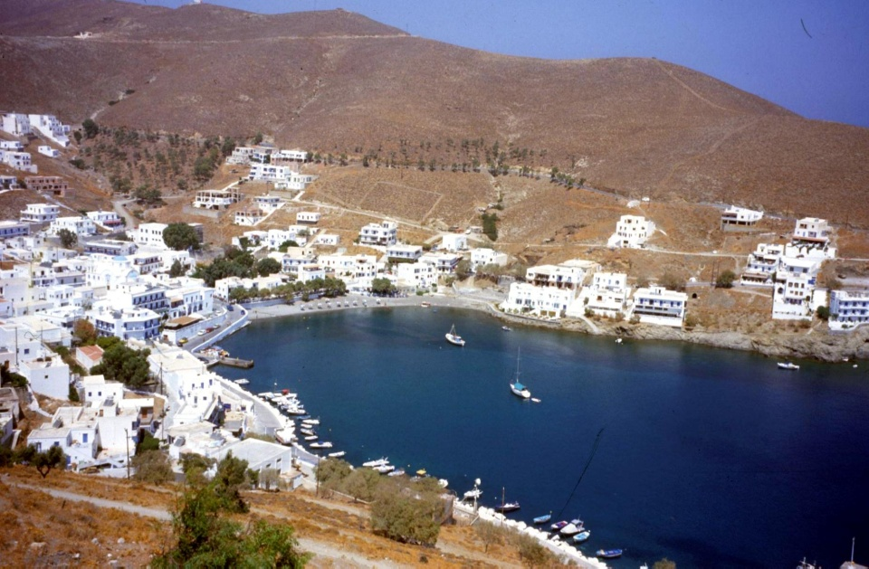 Scala auf Astipalaia